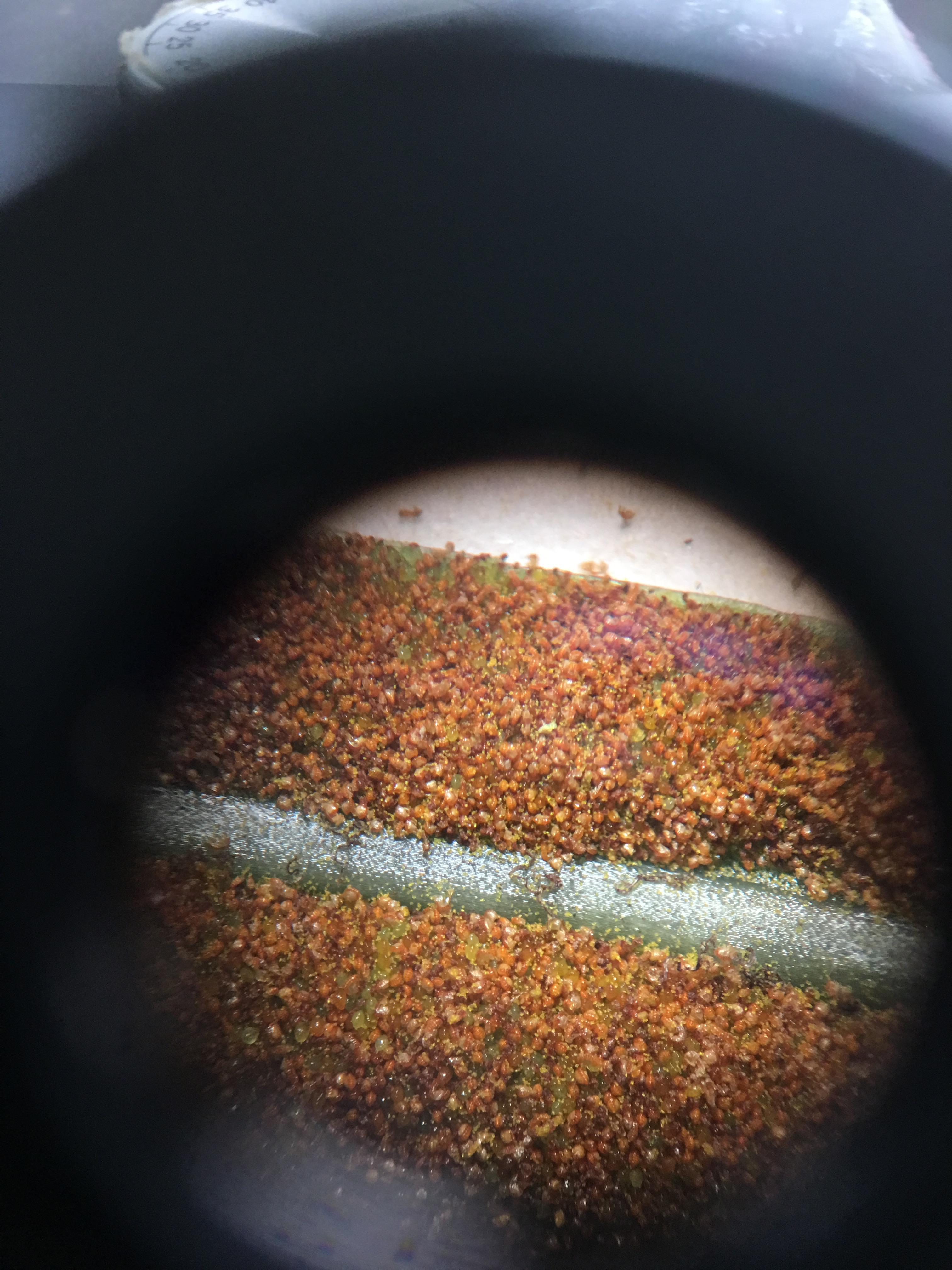 萊蕨孢子葉，孢子囊散生於葉背